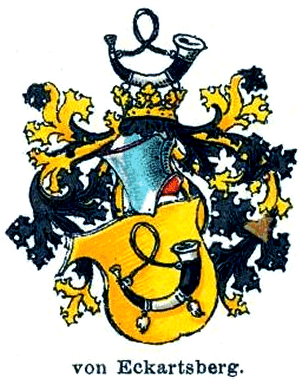 Wappen derer von Eckartsberg